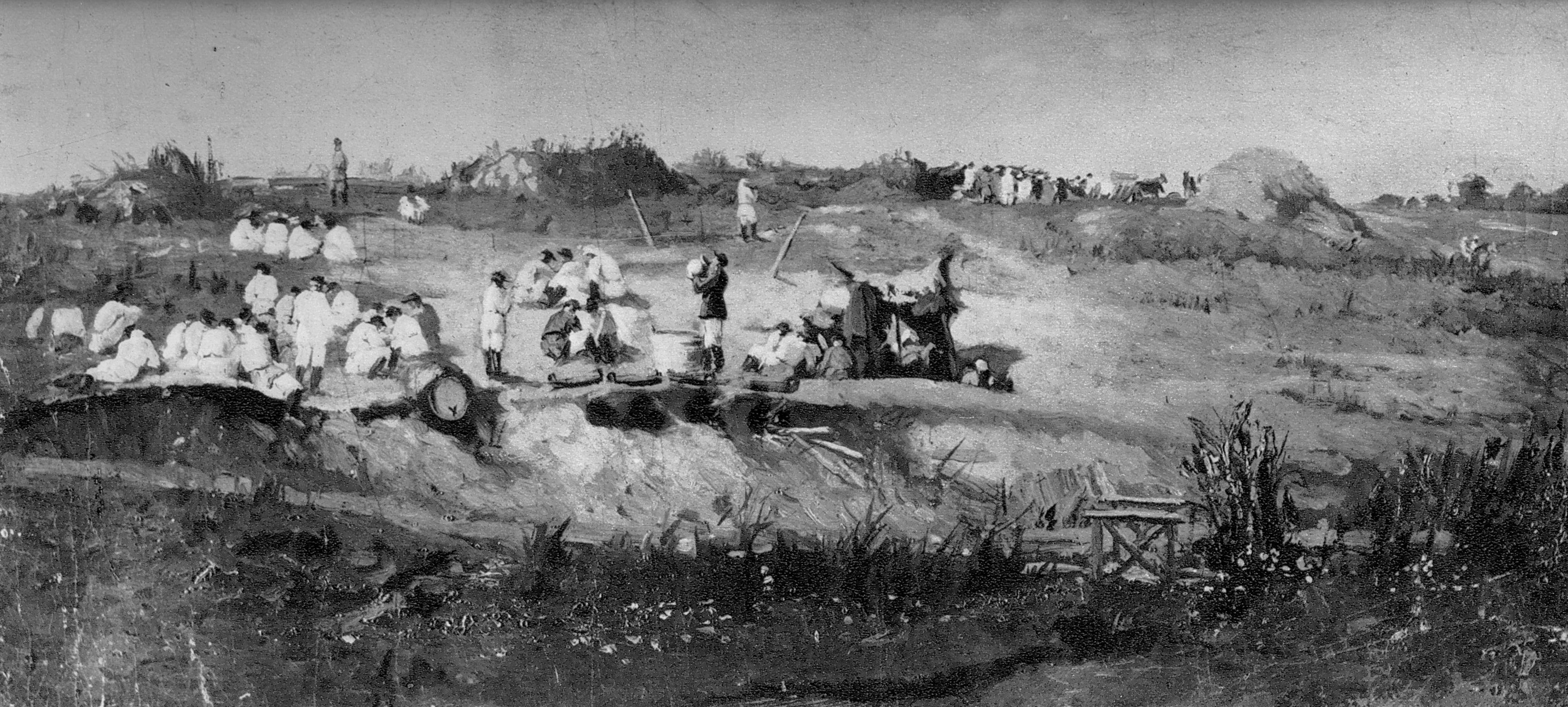 Tabără la 1877 (1877 Camp)